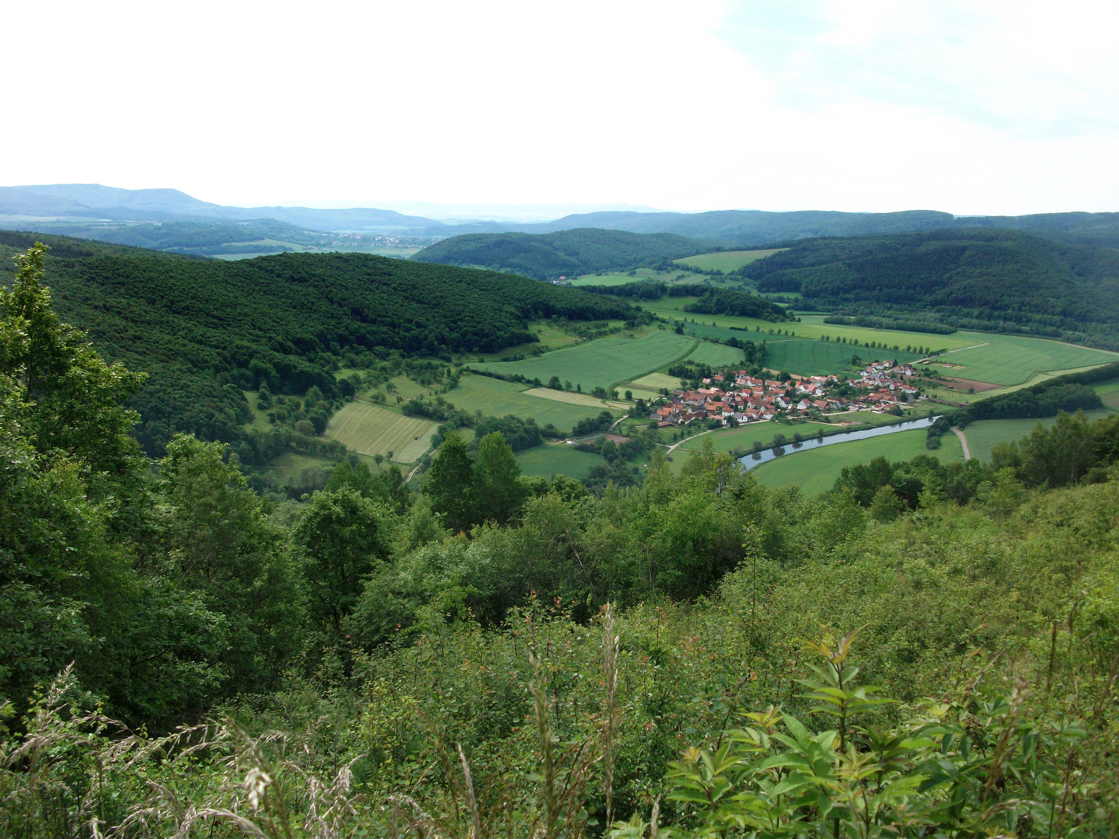 Vogelschutzgebiet Werrabergland südwestlich Uder, WDPA ID 555537539. Blick von der Junkerkuppe (Lindewerra- oder Ministerblick am Scheerenkopf) auf das Werratal bei Lindewerra.